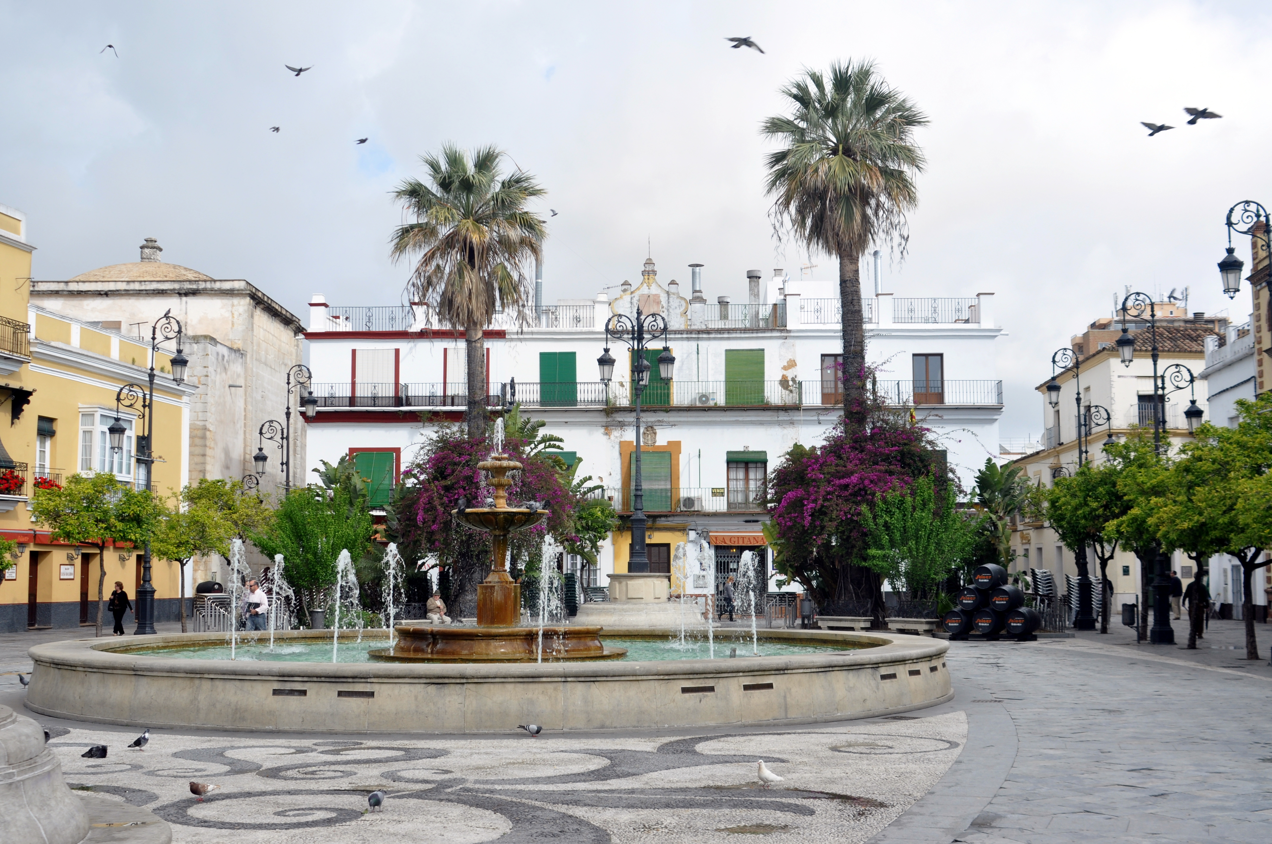 Plaza del Cabildo. Sanlúcar de Barrameda (Cádiz, España).